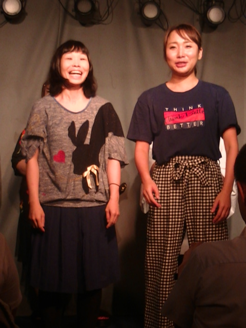 うみのいえ (2018年9月)